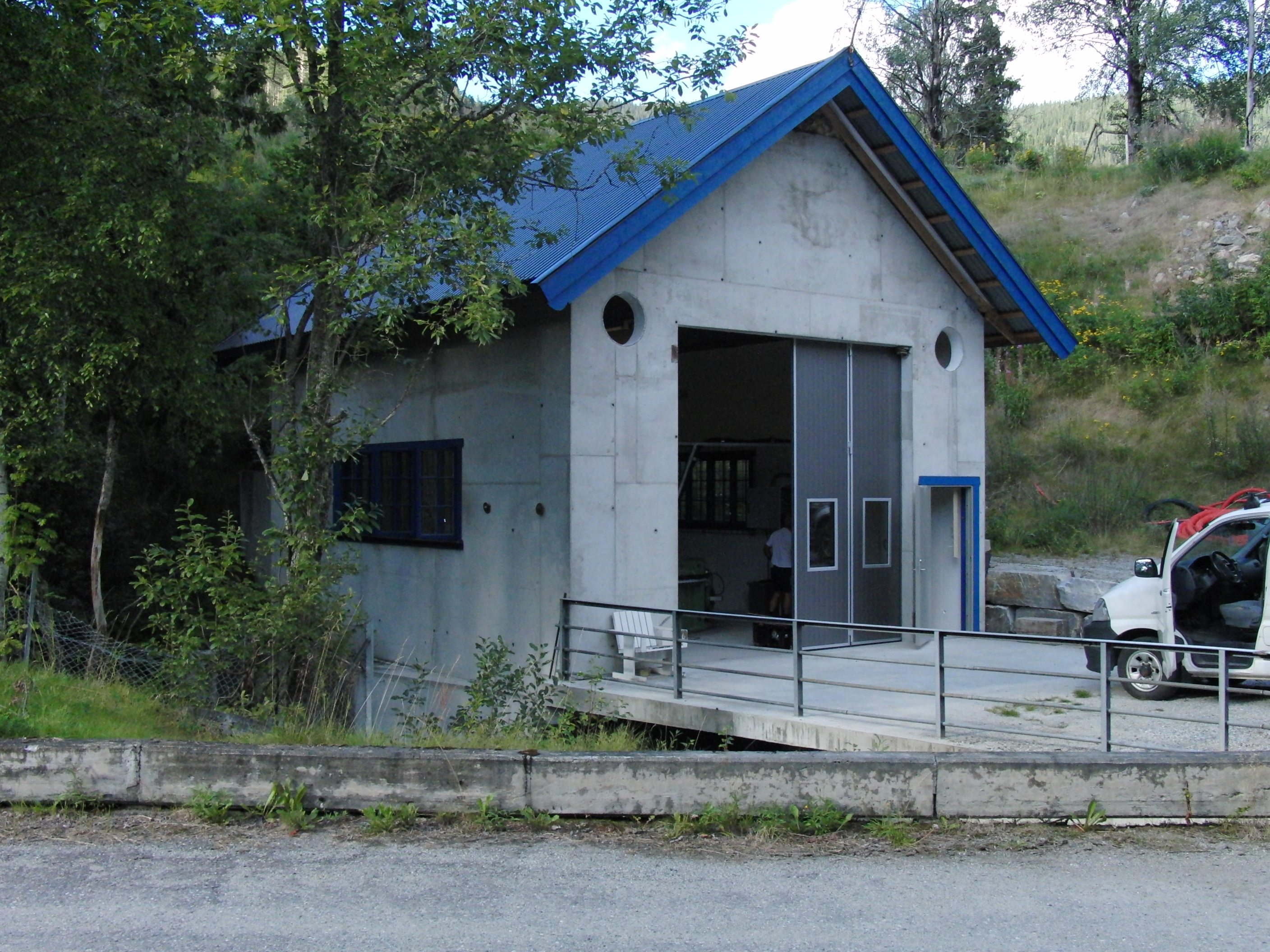 Smådøla kraftverk, Rødberg